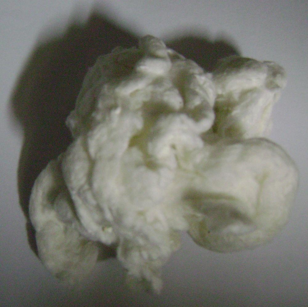 Fotorafía de nitrcelulosa